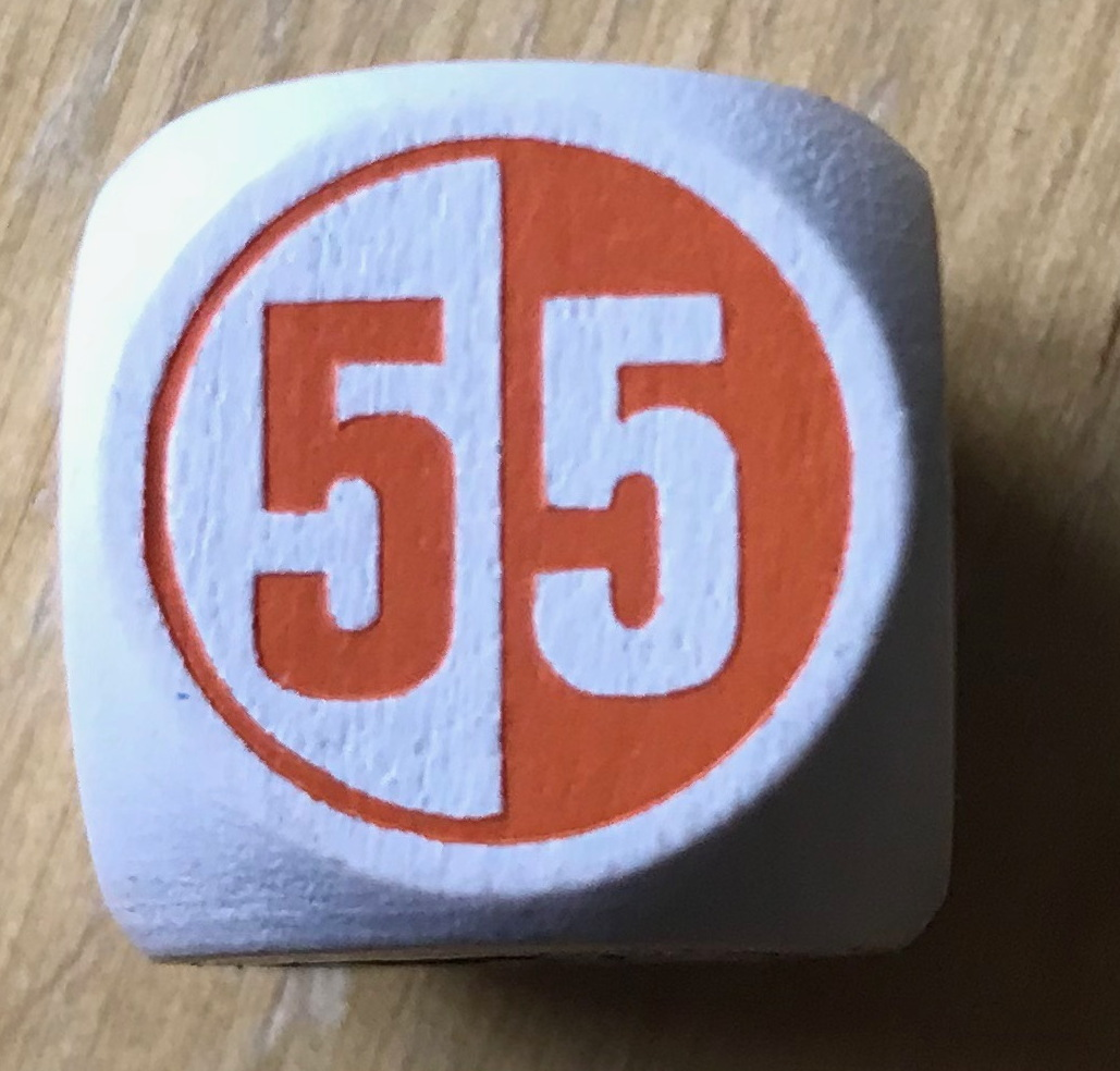 Spielmaterial des Spiels Make 'n' Break, Ravensburger 2017